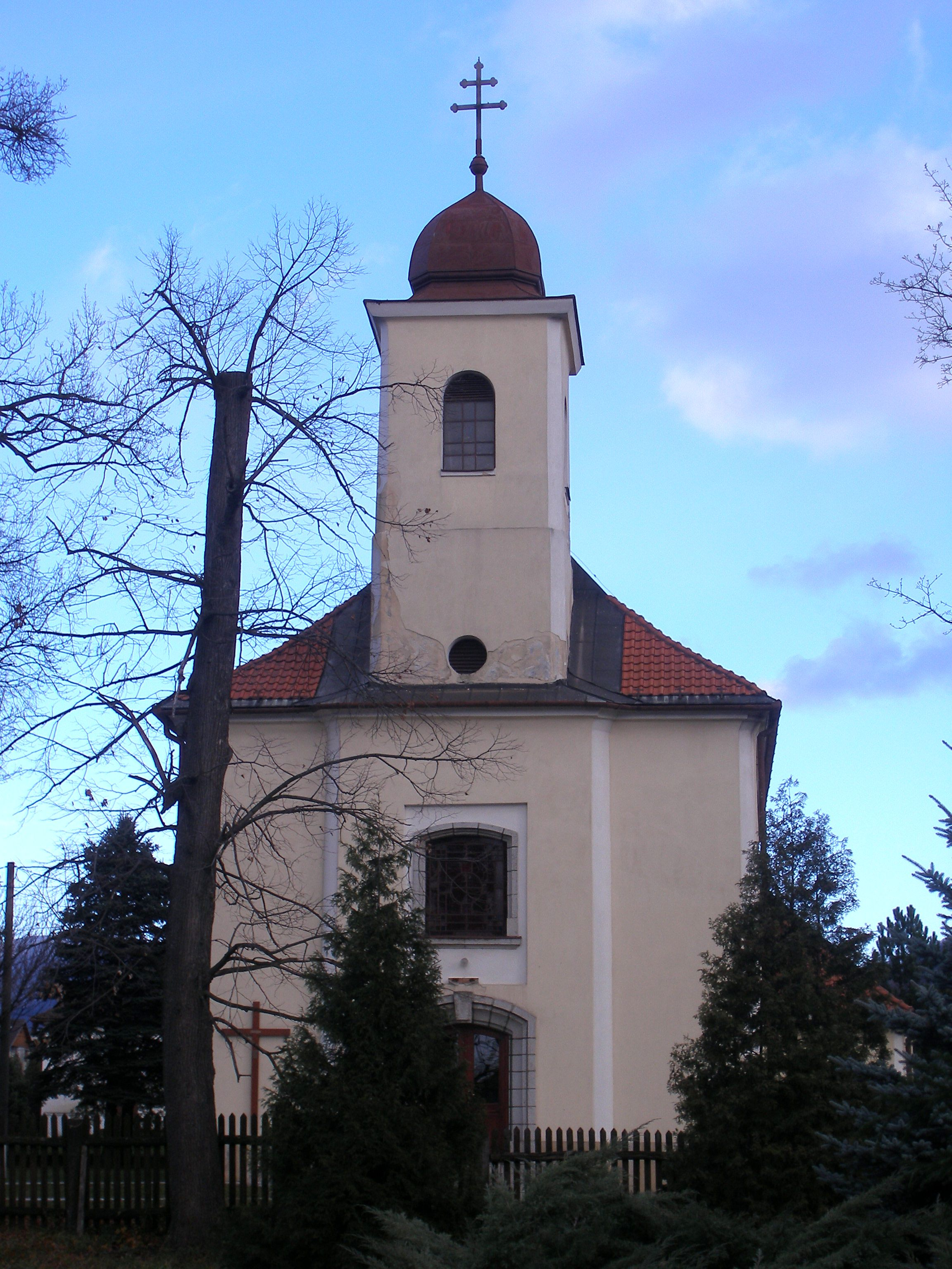 Obec Kokošovce v okrese Prešov